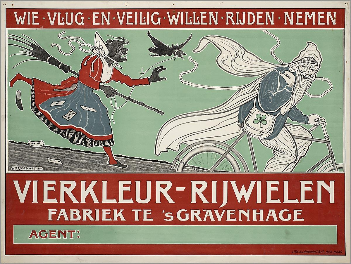 Affiche: "Wie vlug en veilig willen rijden nemen Vierkleur-rijwielen."